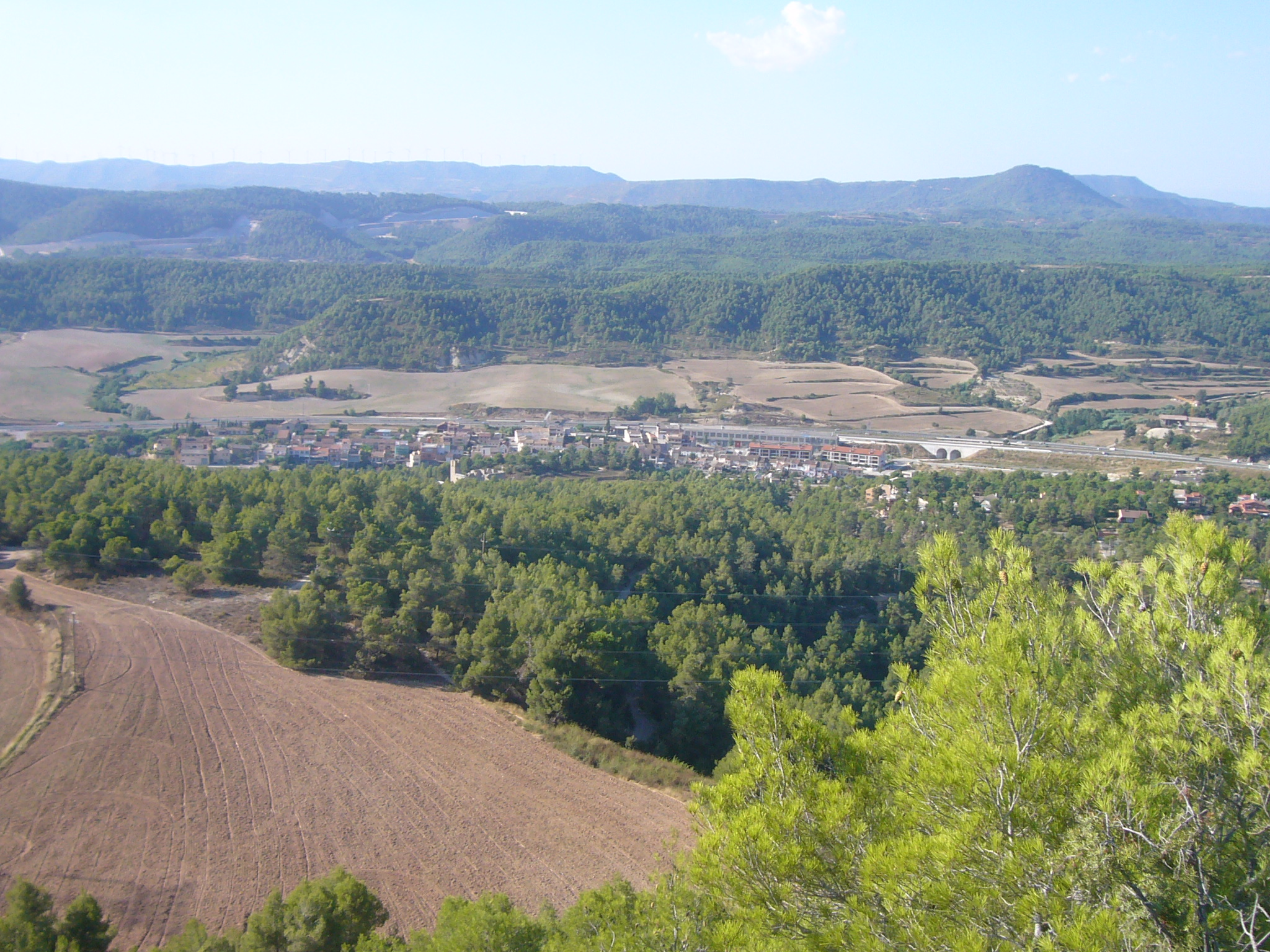 Poble de Castellolí vist des del cim del castell de Castellolí.